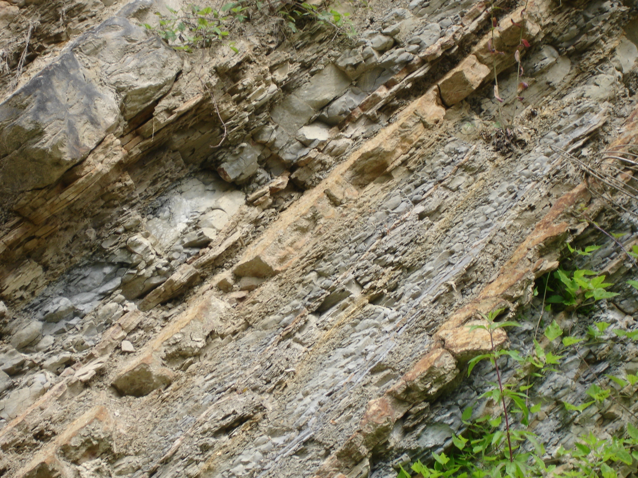 France, Ariège (09), Lavelanet, Anticlinal